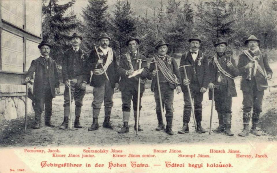 Horskí vodcovia vo Vysokých Tatrách, členovia Uhorského karpatského spolku